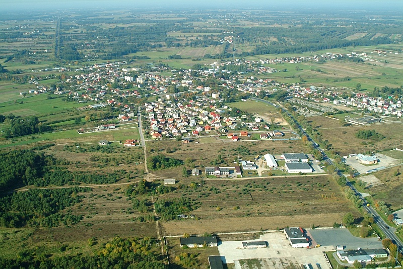 Zdjęcie lotnicze miejscowości Kałuszyn znad części wschodniej w kierunku zachodnim